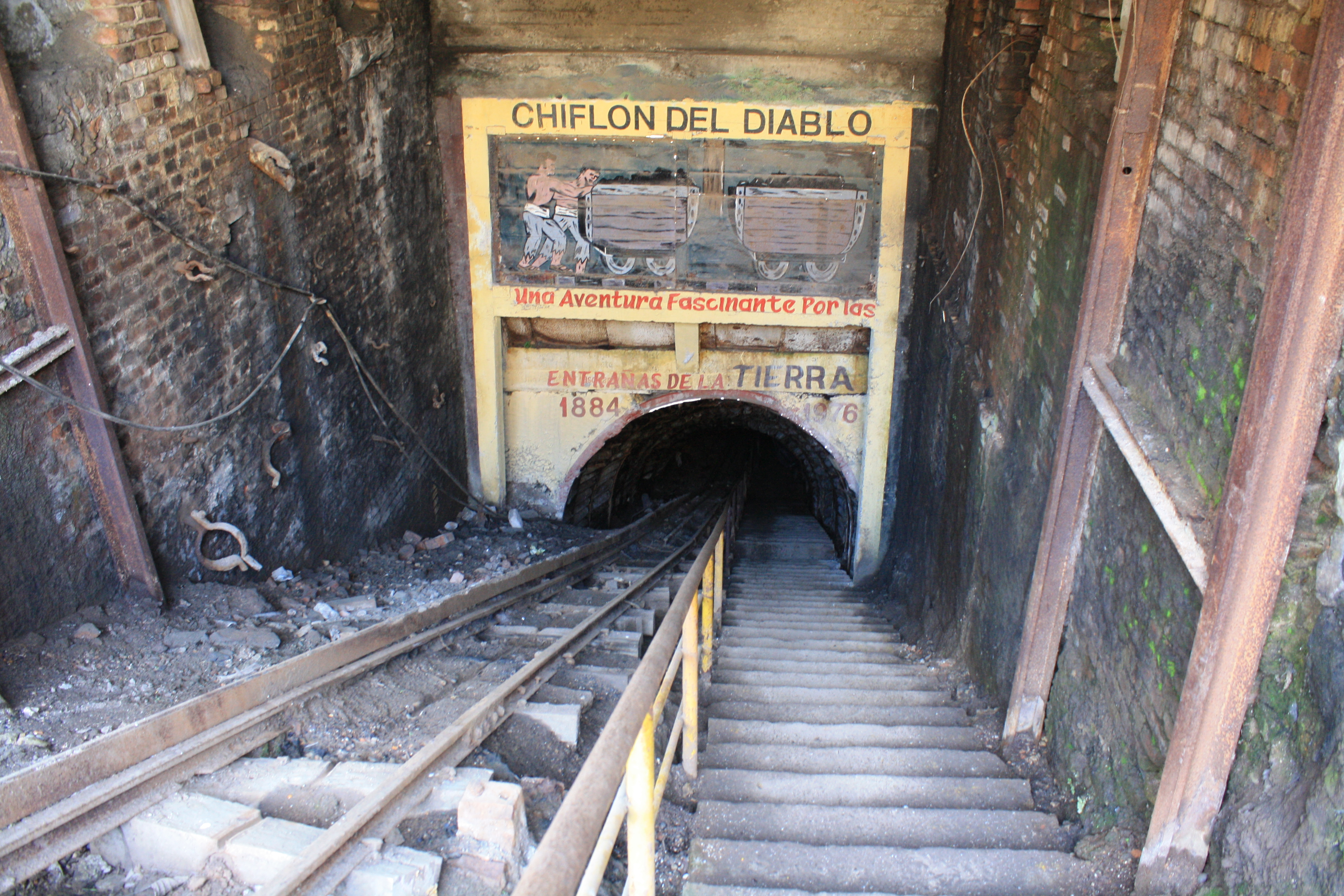 entrada principal al pique This is a photo of a national monument in Chile: 2129